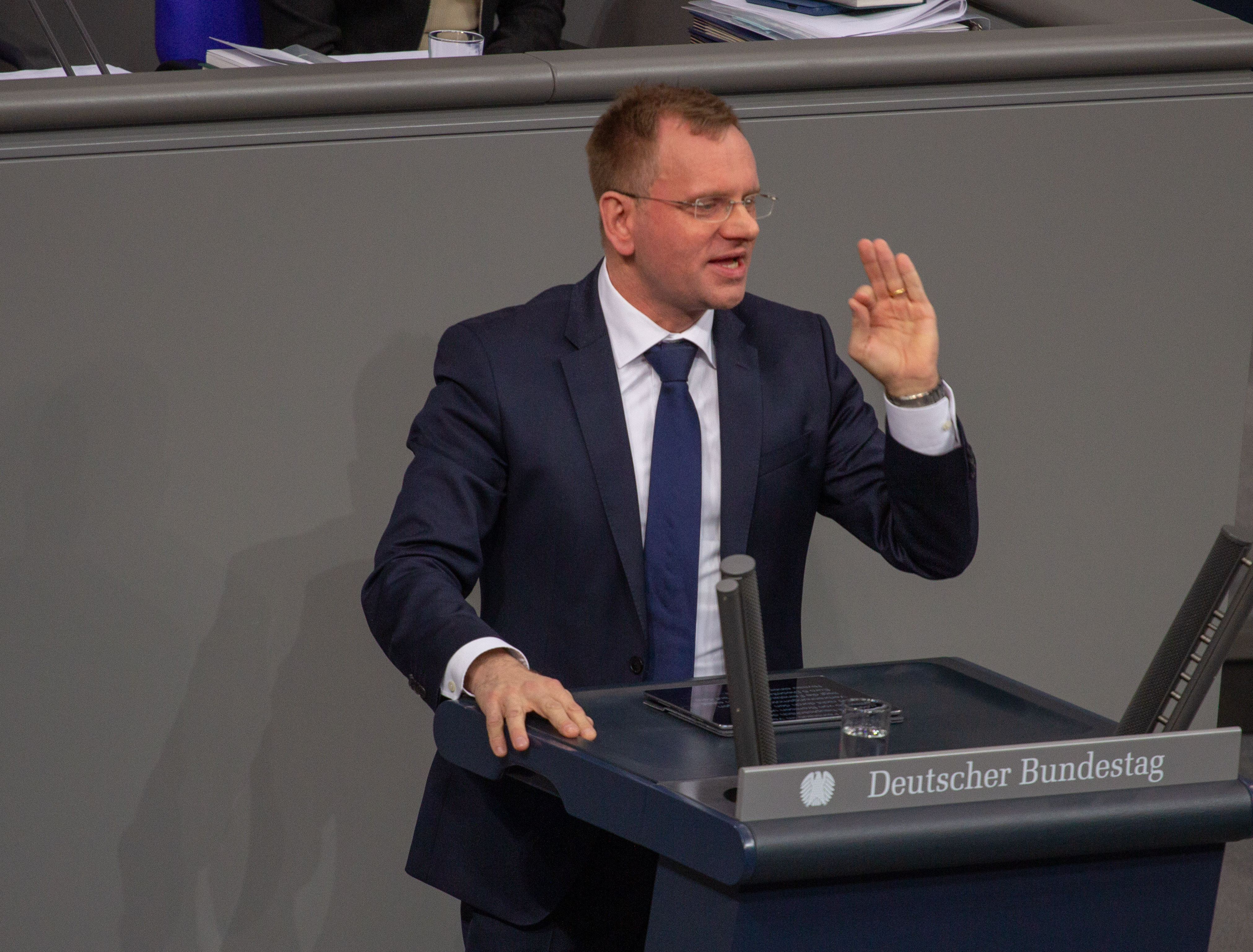 Dirk Spaniel, Mitglied des Deutschen Bundestages, während einer Plenarsitzung am 11. April 2019 in Berlin.